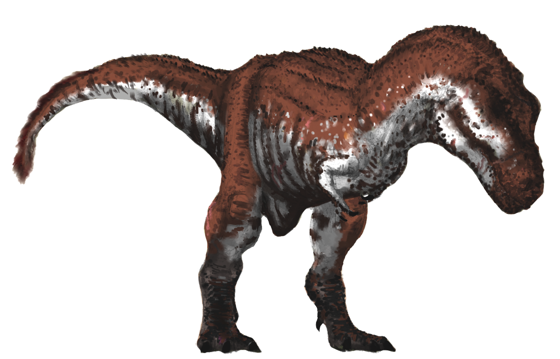 Tyrannosaurus rex